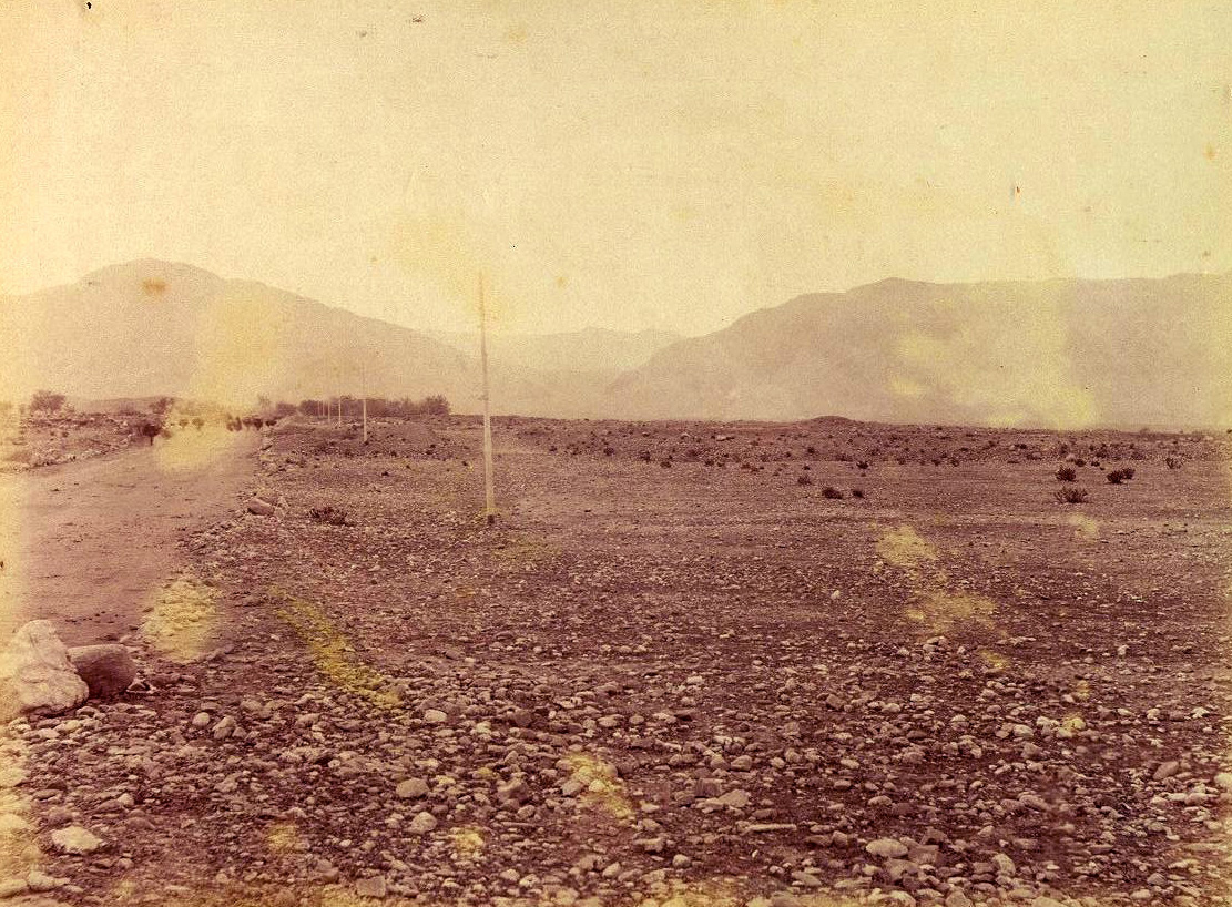 Khyber Pass 1891